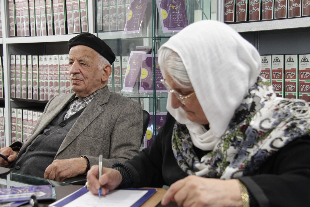 مهدی محقق و نوش آفرین انصاری در مرکز پژوهشی دانشنامه های حقوقی علامه